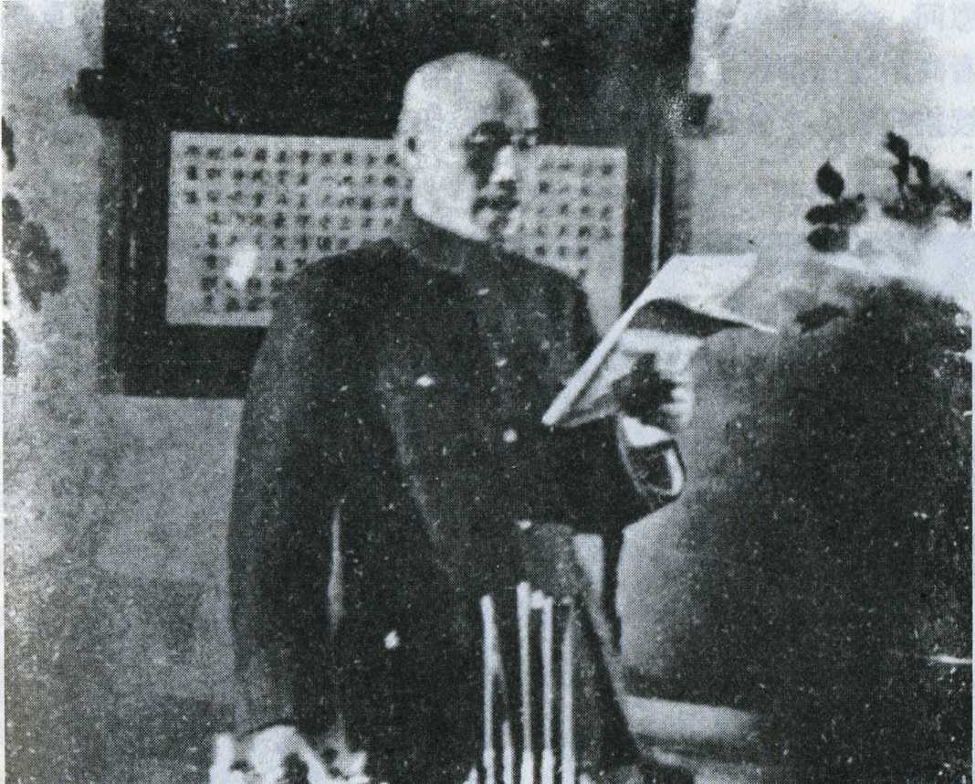 Chungking Negotiation and Chiang's talk